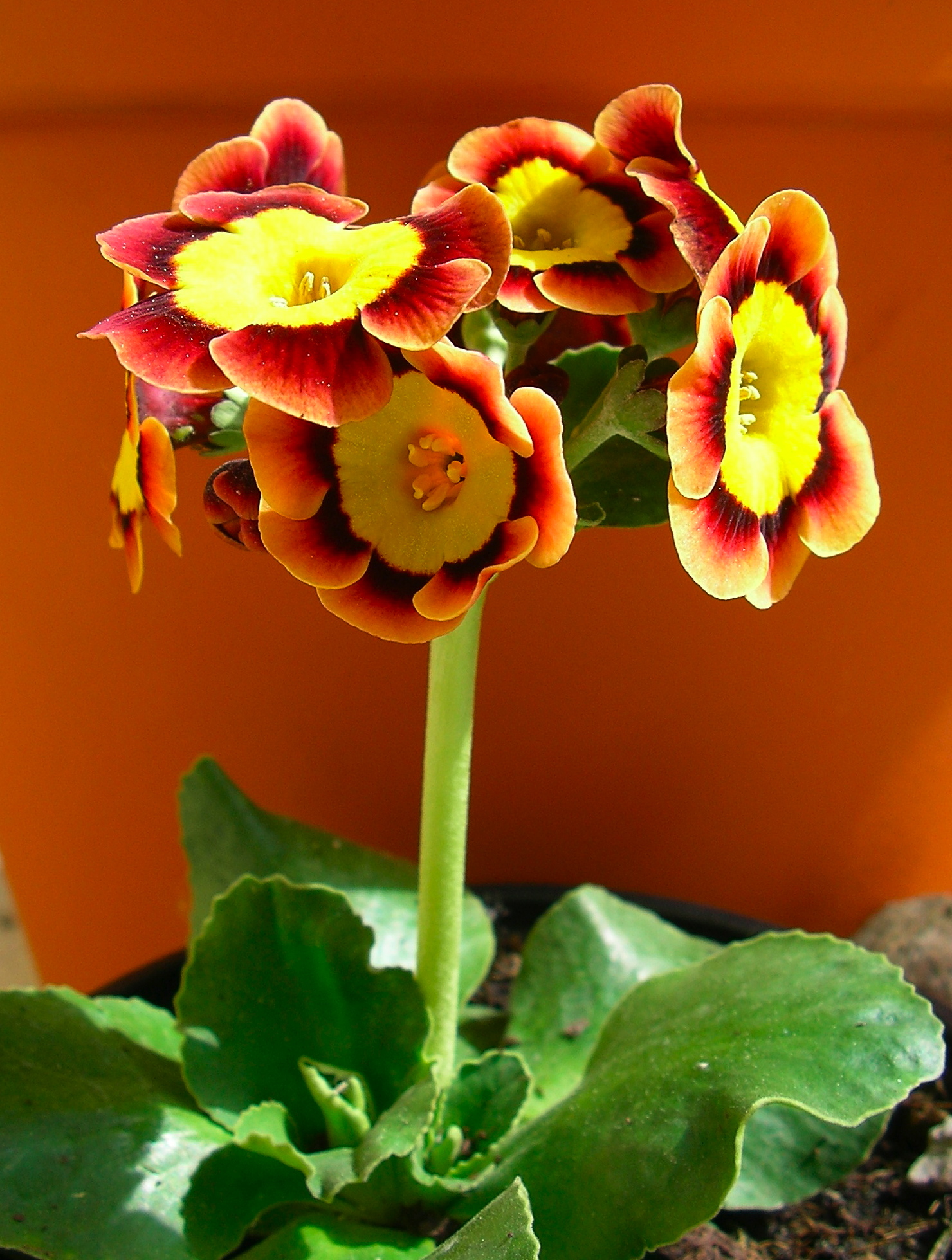 garden auricula, Primula x pubescens cultivar